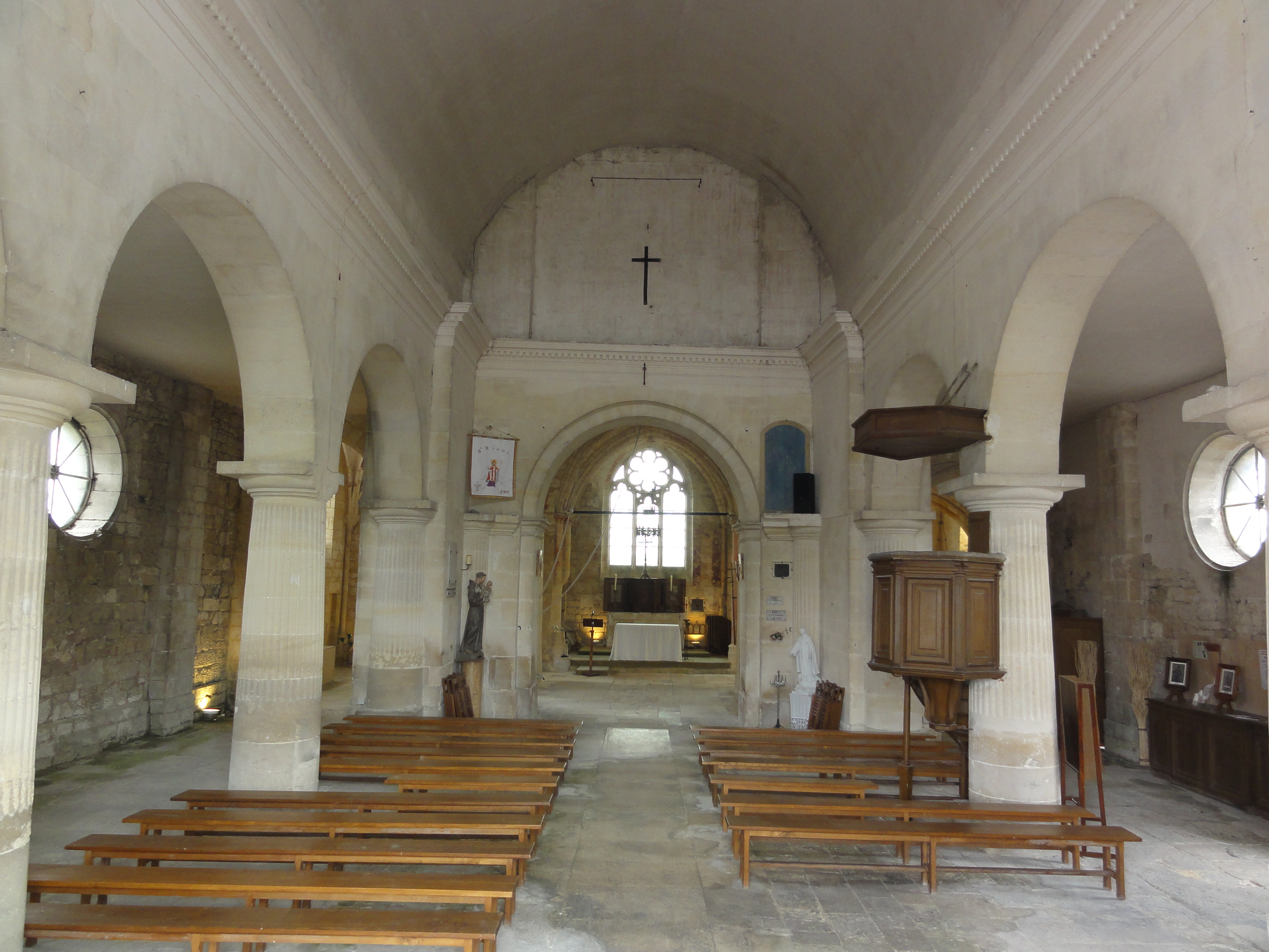 Église Saint-Paul-et-Saint-Rieul de Brenouille, intérieur